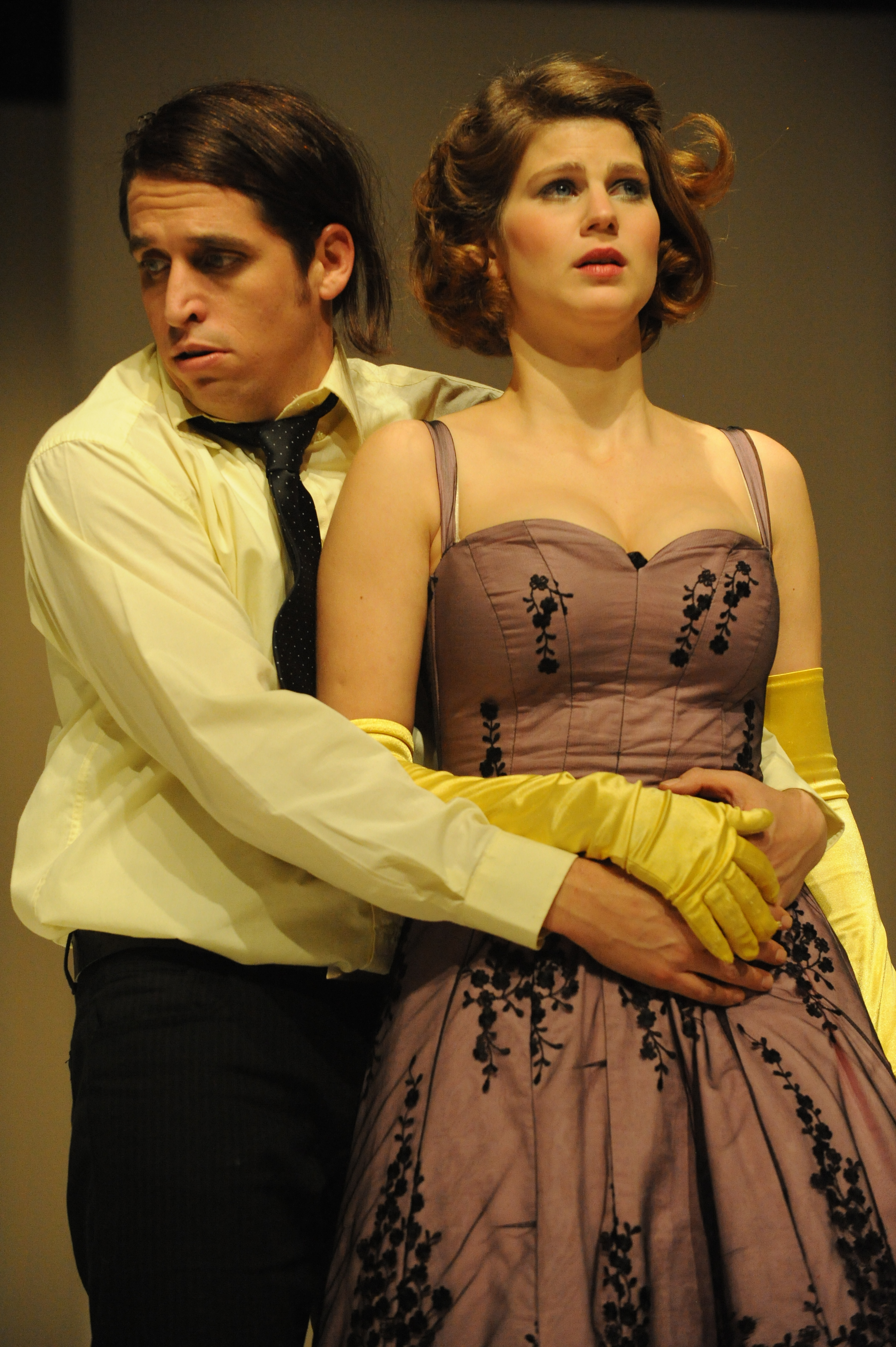 שמרית לוסטיג ויואב היימן בהצגה "תעלולי סקפן", בבימויו של אודי בן-משה, תיאטרון החאן, 2010